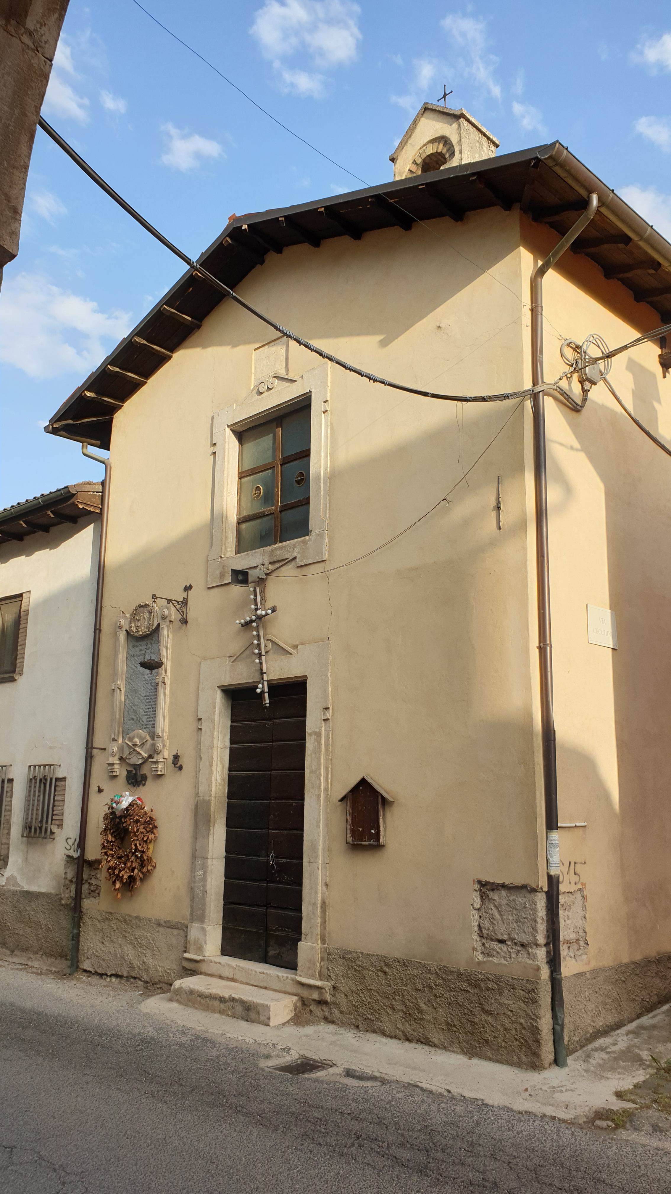 Chiesa di San Bernardino (Sassa, L'Aquila)